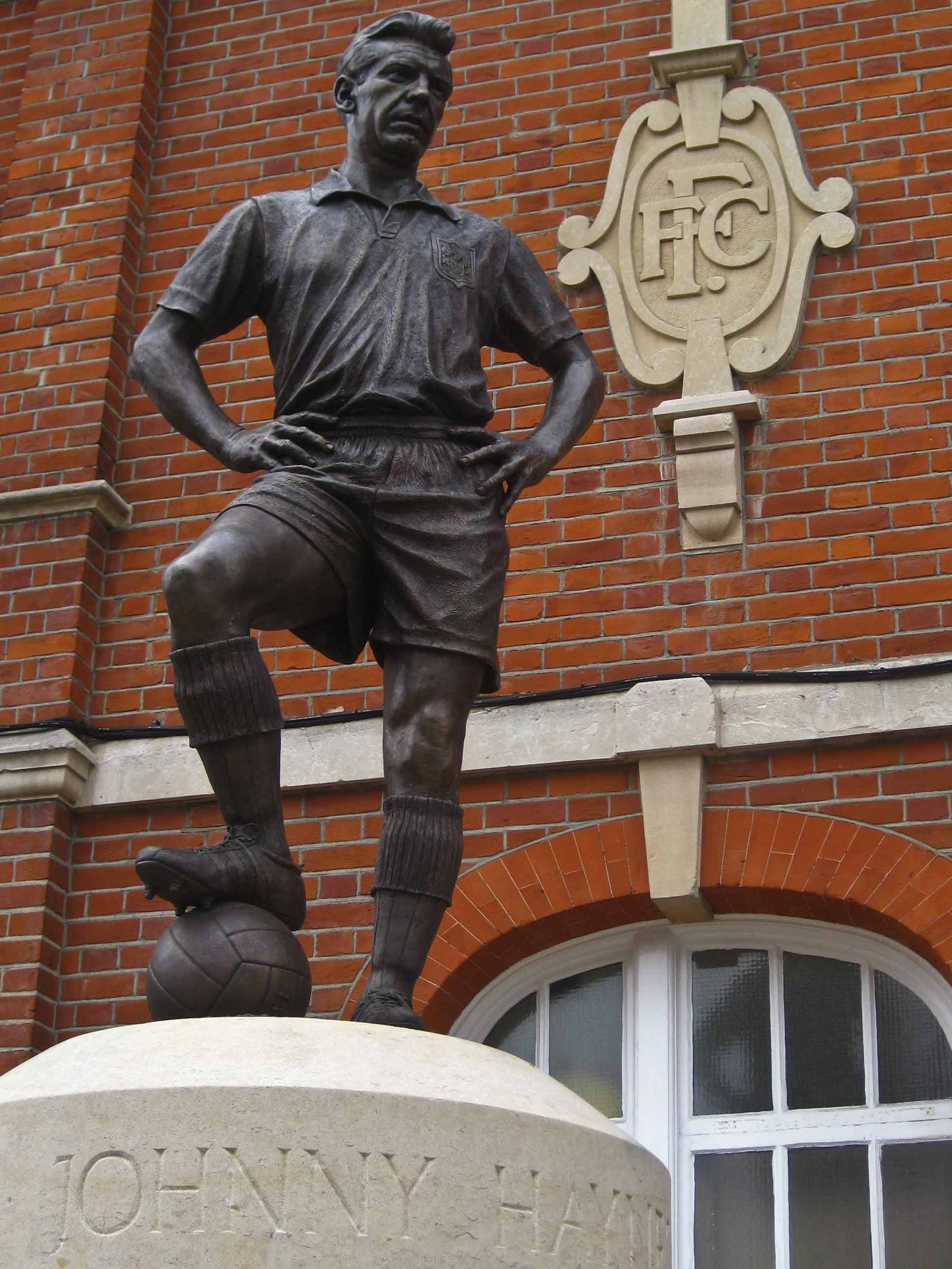 Johnny Haynesin patsas.